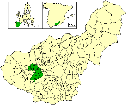 Mapa del partido judicial de Santa Fe, en la provincia de Granada (España)